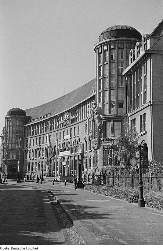 Original image description from the Deutsche Fotothek Außenansicht Hauptgebäude mit Bücherturm